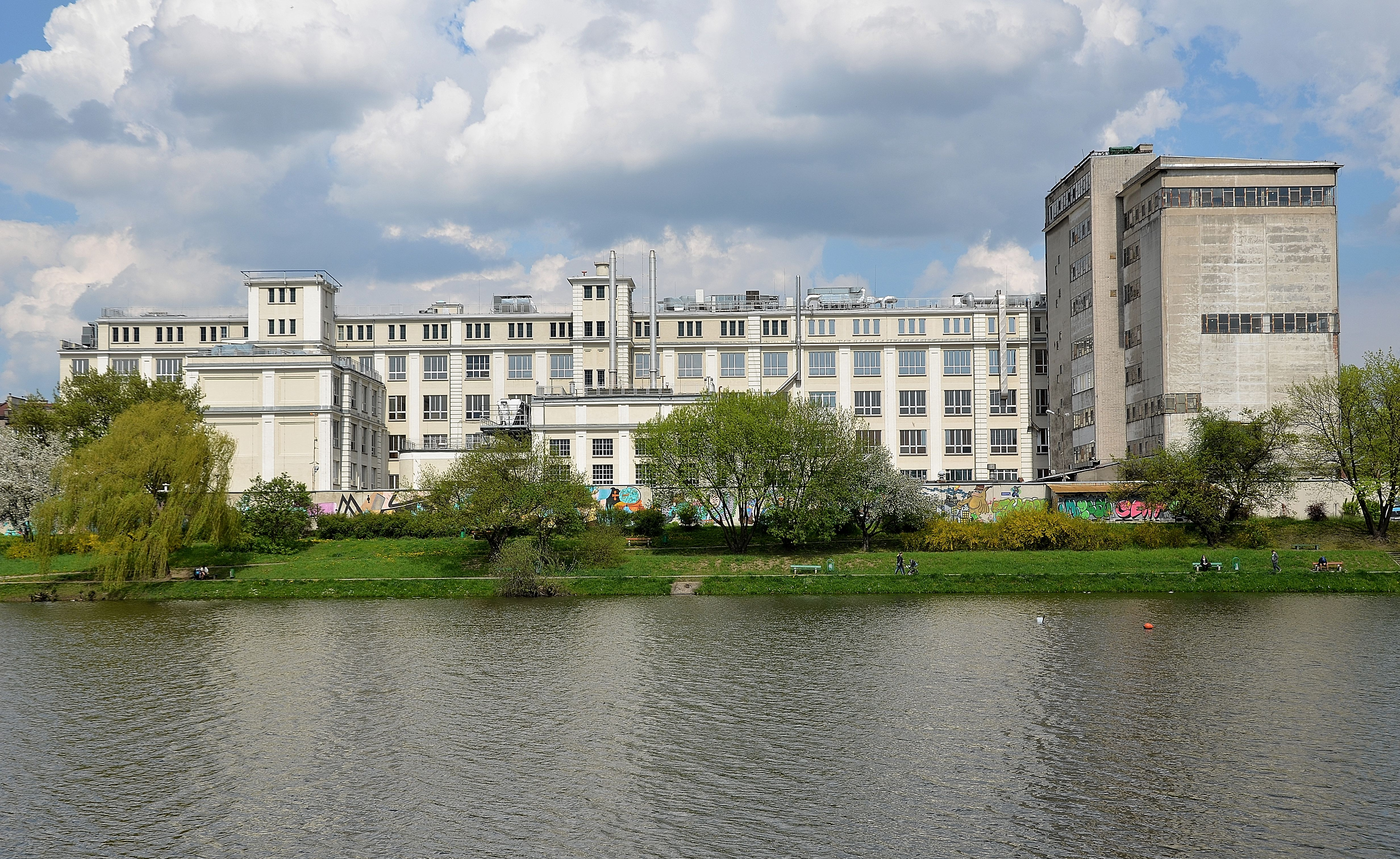 Fabryka Wedla od strony Jeziorka Kamionowskiego